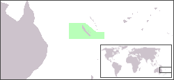 Locatie Nieuw Caledonie - eigen werk GFDL.